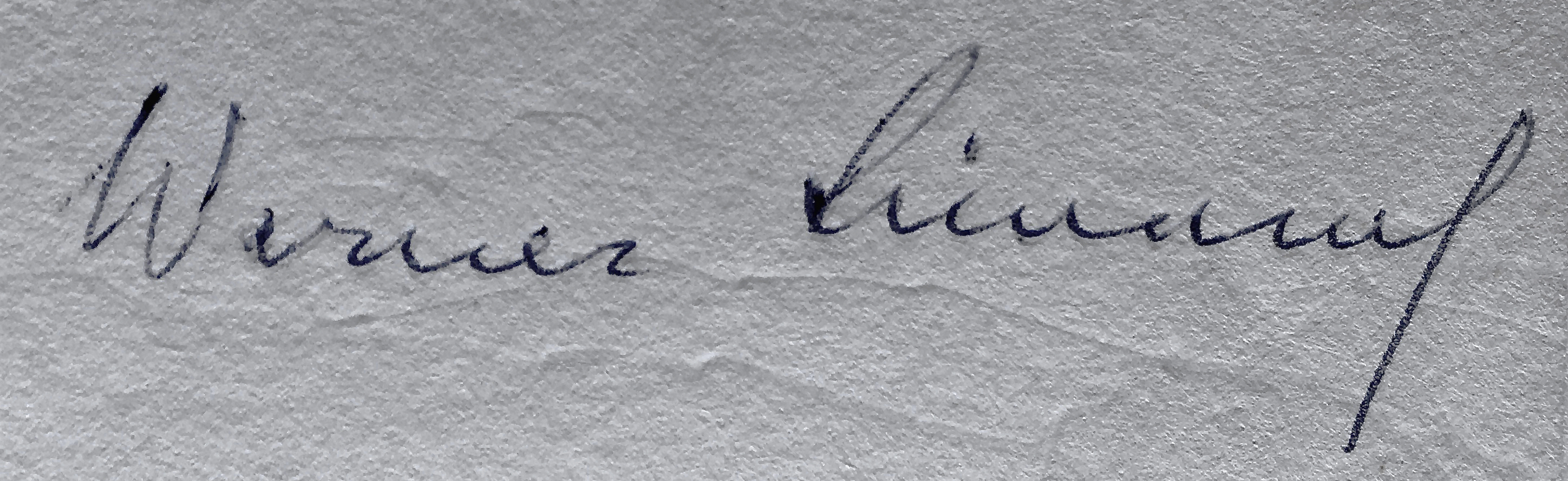 Werner Leibbrand. Signatur einer mir von ihm und seiner Frau Weihnachten 1972 zugedachten Widmung auf dem Vorsatzpapier von Band I des von beiden verfaßten Werkes »Formen des Eros«.